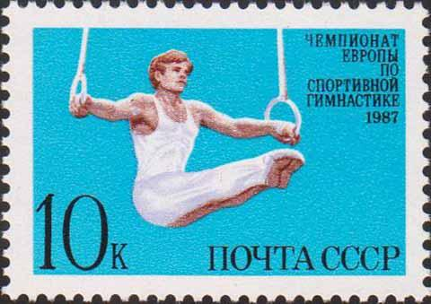 Почтовая марка СССР. 1987. Чемпионат Европы по спортивной гимнастике